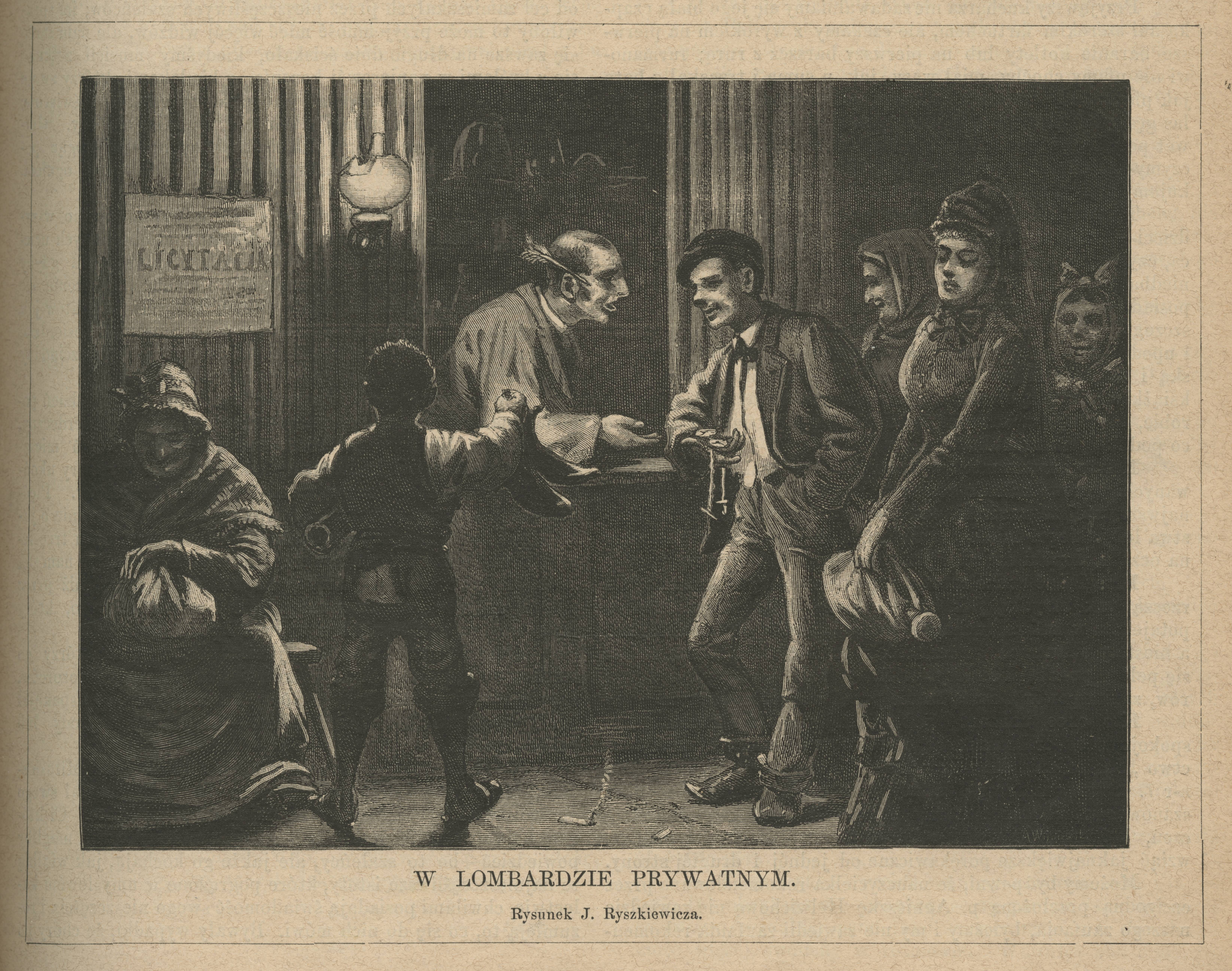 W lombardzie prywatnym